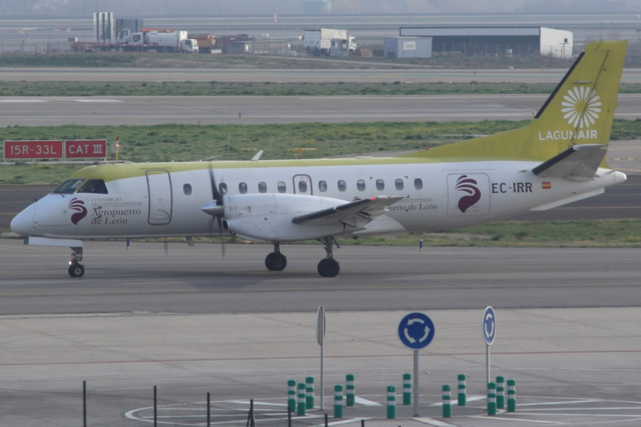 Lagunair Saab 340A EC-IRR at MAD